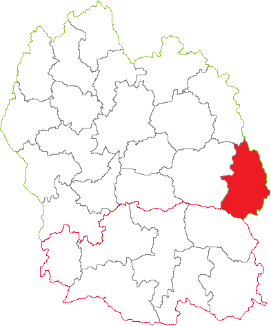 Situation du canton dans le département de la Lozère (France)